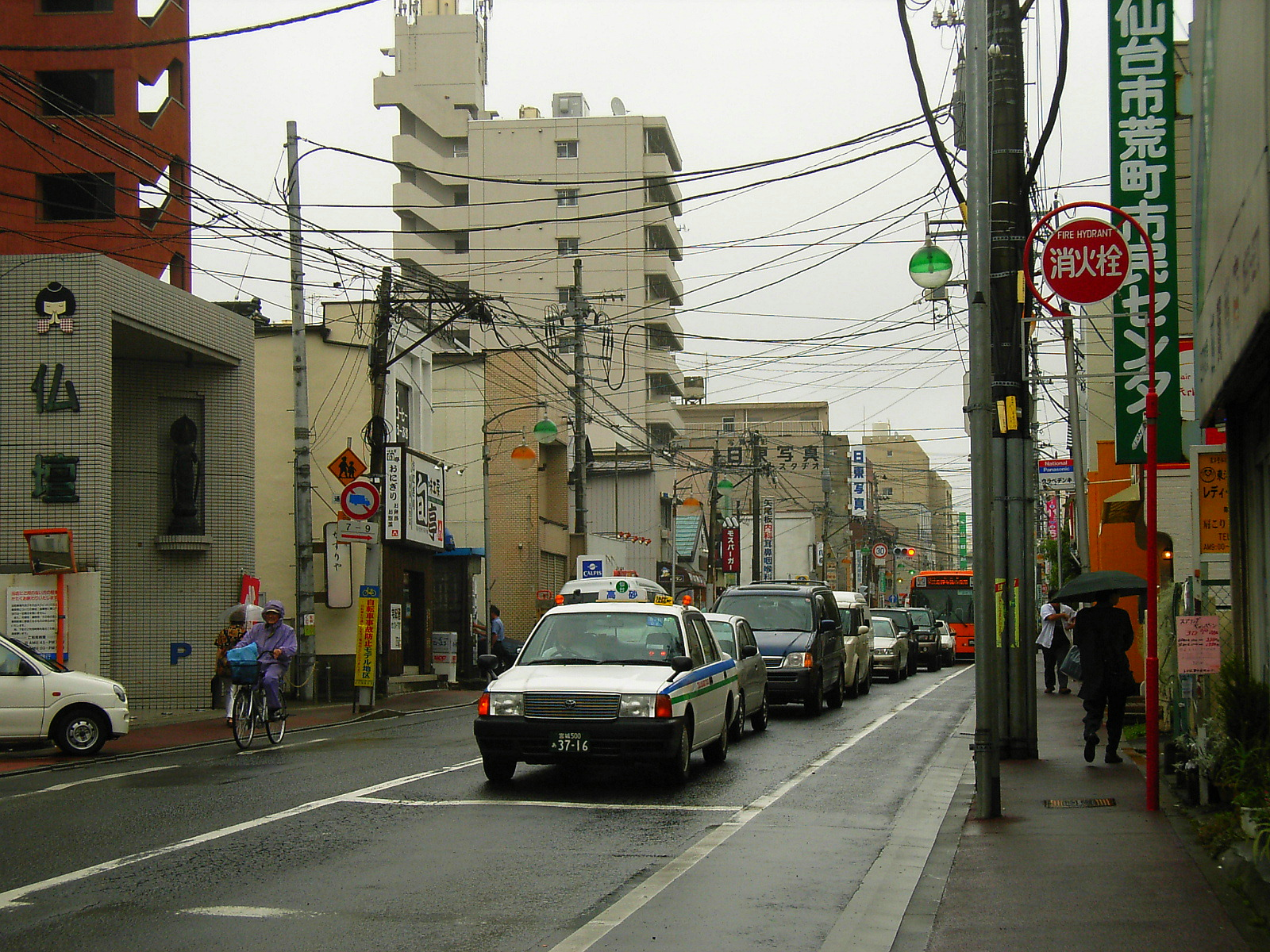 Miyagi Prefectural Road 235, Arai-Aramachi Line. Sendai, Miyagi prefecture, Japan.